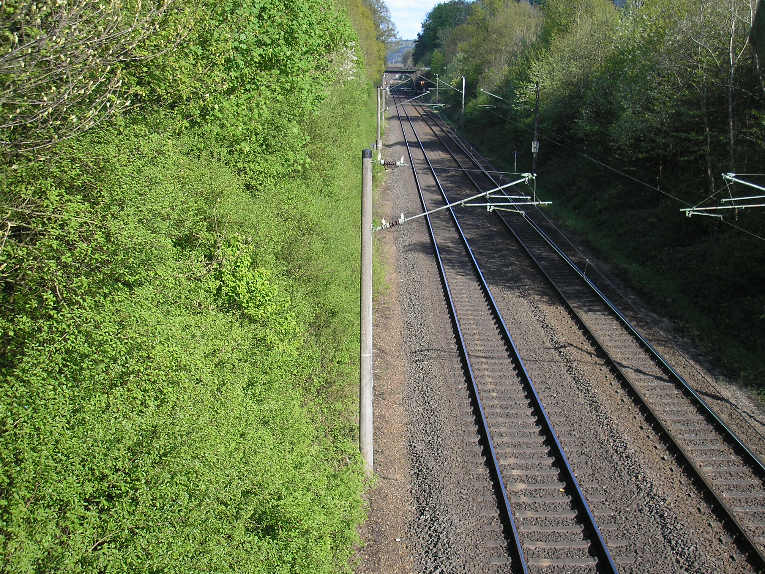 Porta Rhenania, Siegtalstrecke, Einschnitt im Schlossberg zwischen Altwindeck und Schladern